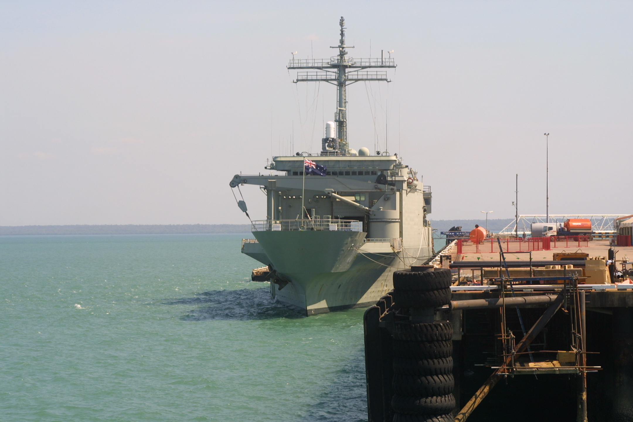 HMAS Kanimbla in Darwin